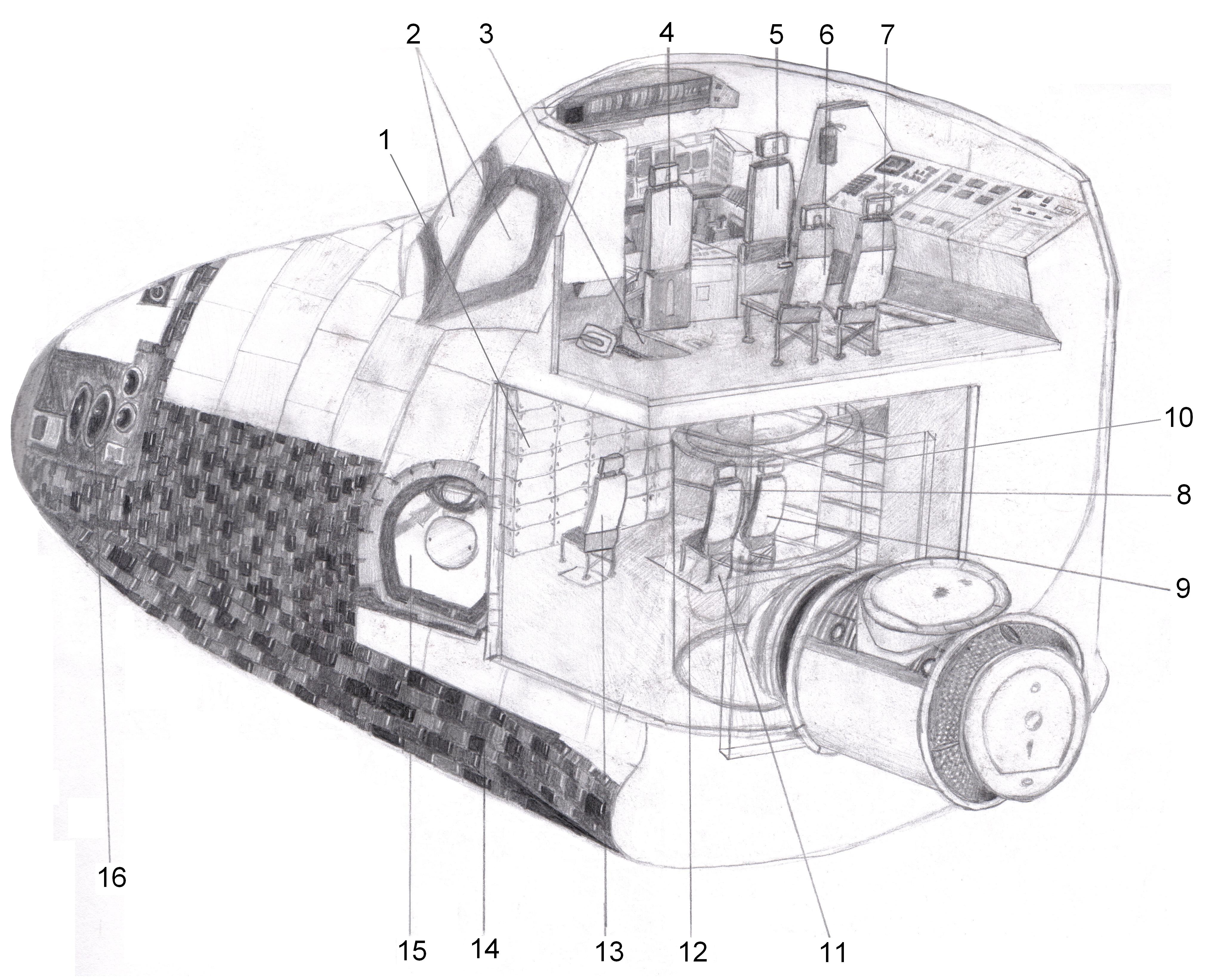 Predná časť družicového stupňa raketoplánu - orbitera s prierezom.